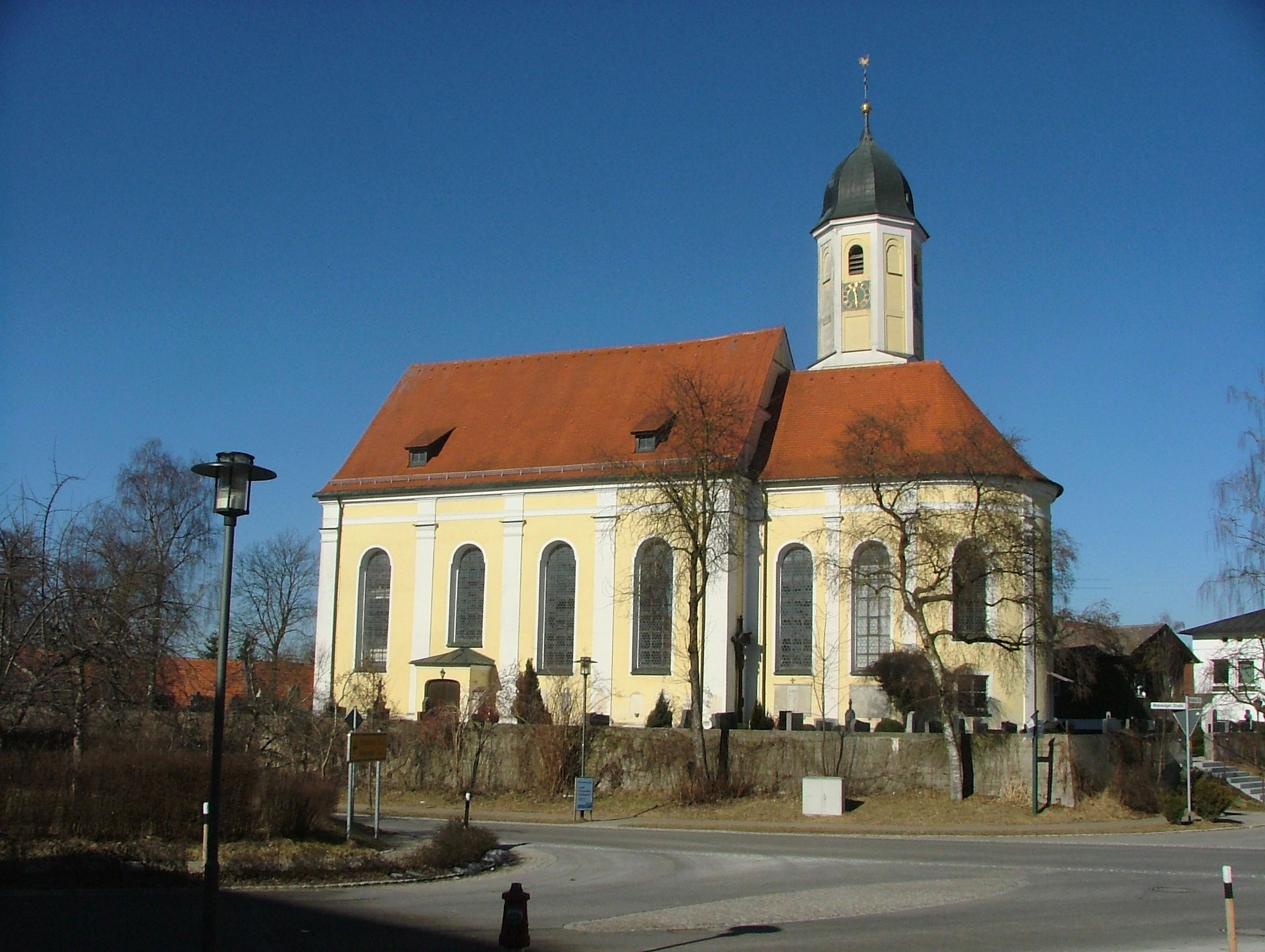 Pfarrkirche